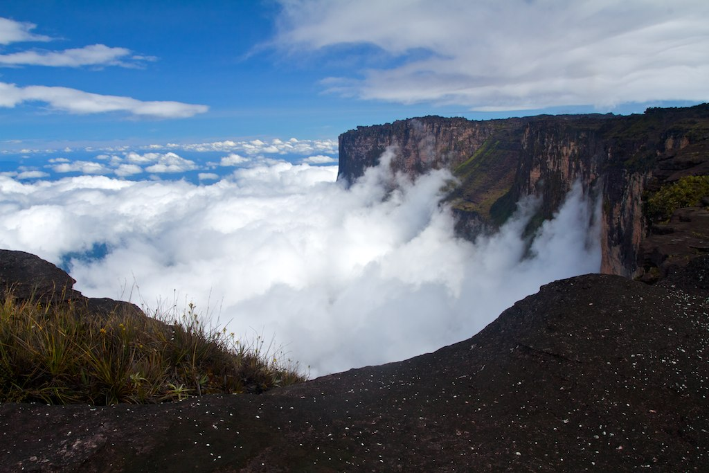 Mount Roraima cliffs, Venezuela